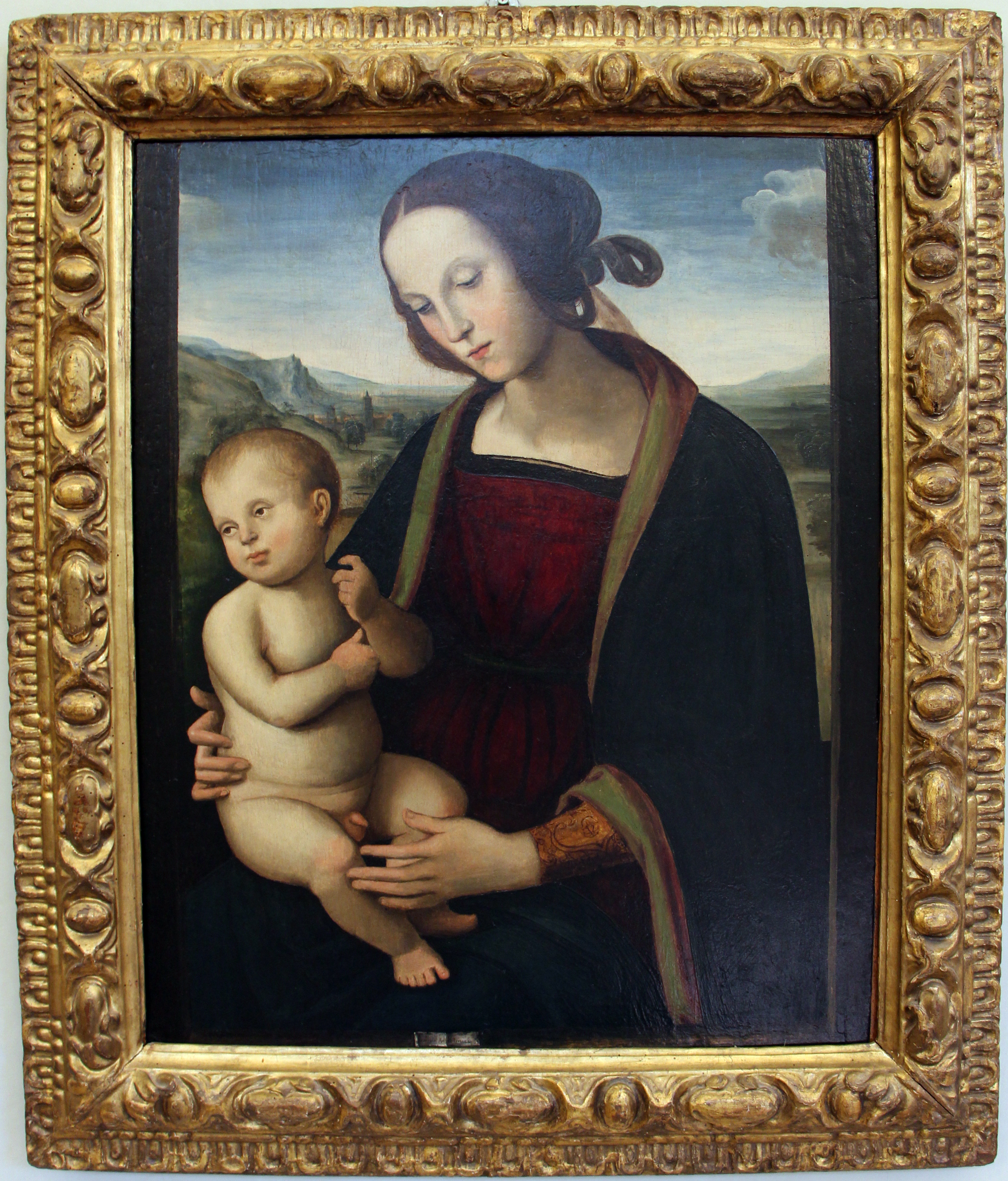 Cenacolo di Fuligno - MIBAC The making of this document was supported by Wikimedia CH. (Submit your project!) For all the files concerned, please see the category Supported by Wikimedia CH. This is a photo of a monument which is part of cultural heritage of Italy.